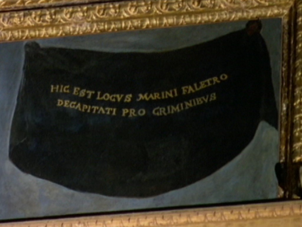 Local onde estaria o retrato de Marino Faliero coberto por um pano preto na Galeria dos Retratos dos Doges de Veneza - Itália